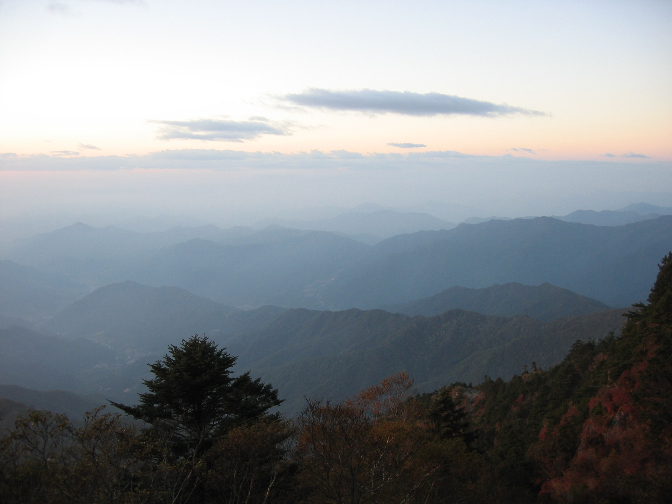 2006년 대한민국 지리산의 모습 The scenery of Jirisan, in South Korea, 2006